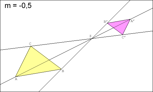 ZentrStreckNeg